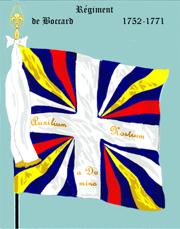 Ordonnanzfahne eines Fremdenregiments im königlich französischen Dienst. (Schweizer Regiment) - Entnommen und überarbeitet aus: „LES UNIFORMES ET LES DRAPEAUX DE L'ARMÉE DU ROI“ Marseille 1899. - Drapeau d'Ordonnance d' un régiment étranger au service française (régiment suisse.)